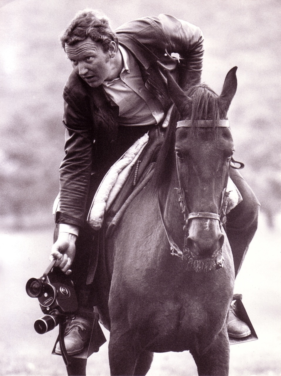 „Pferde - eine dokumentarische Skizze“ - Dreharbeiten in Portugal